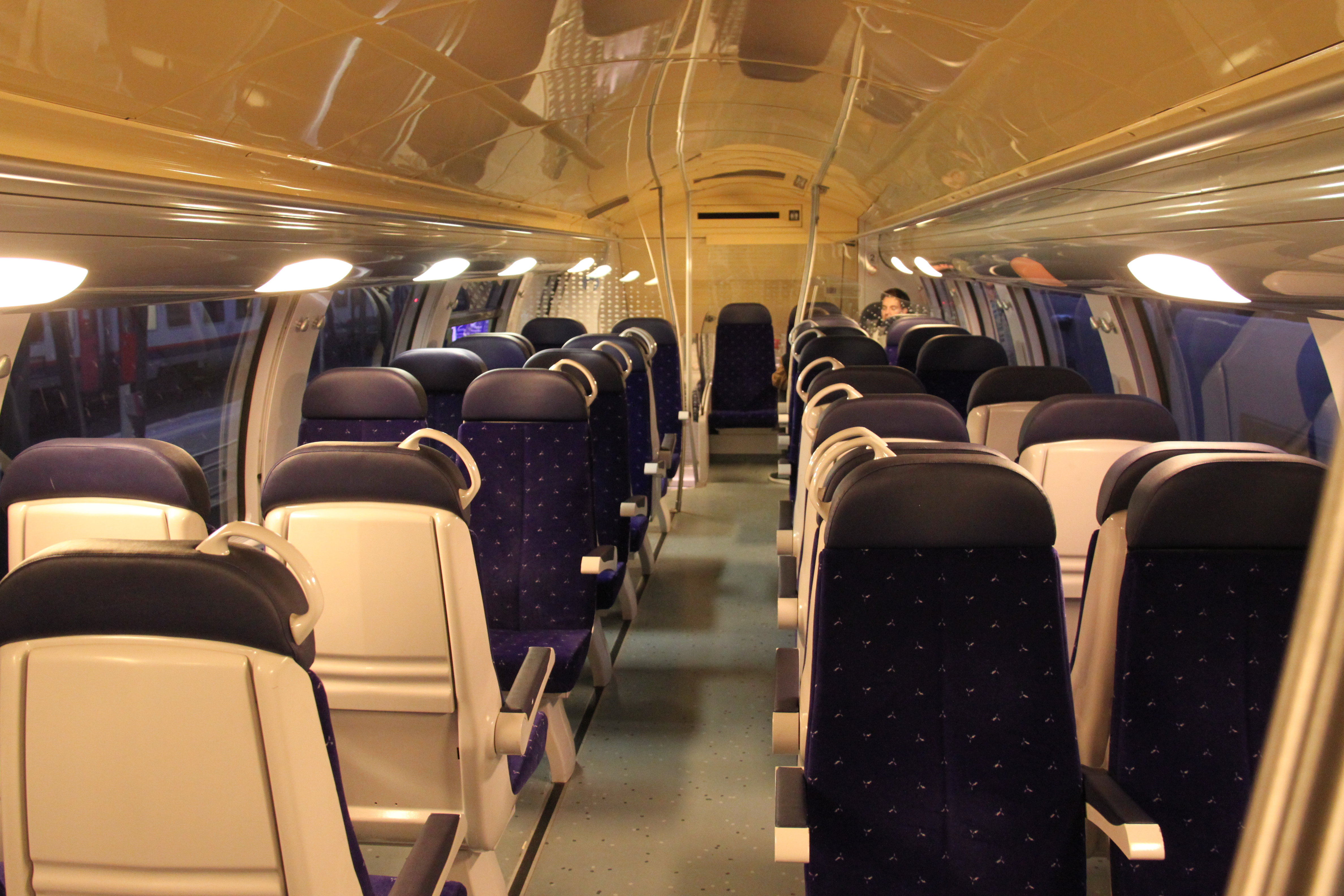 Interieur tweede klasse van een 2200 van de CFL.